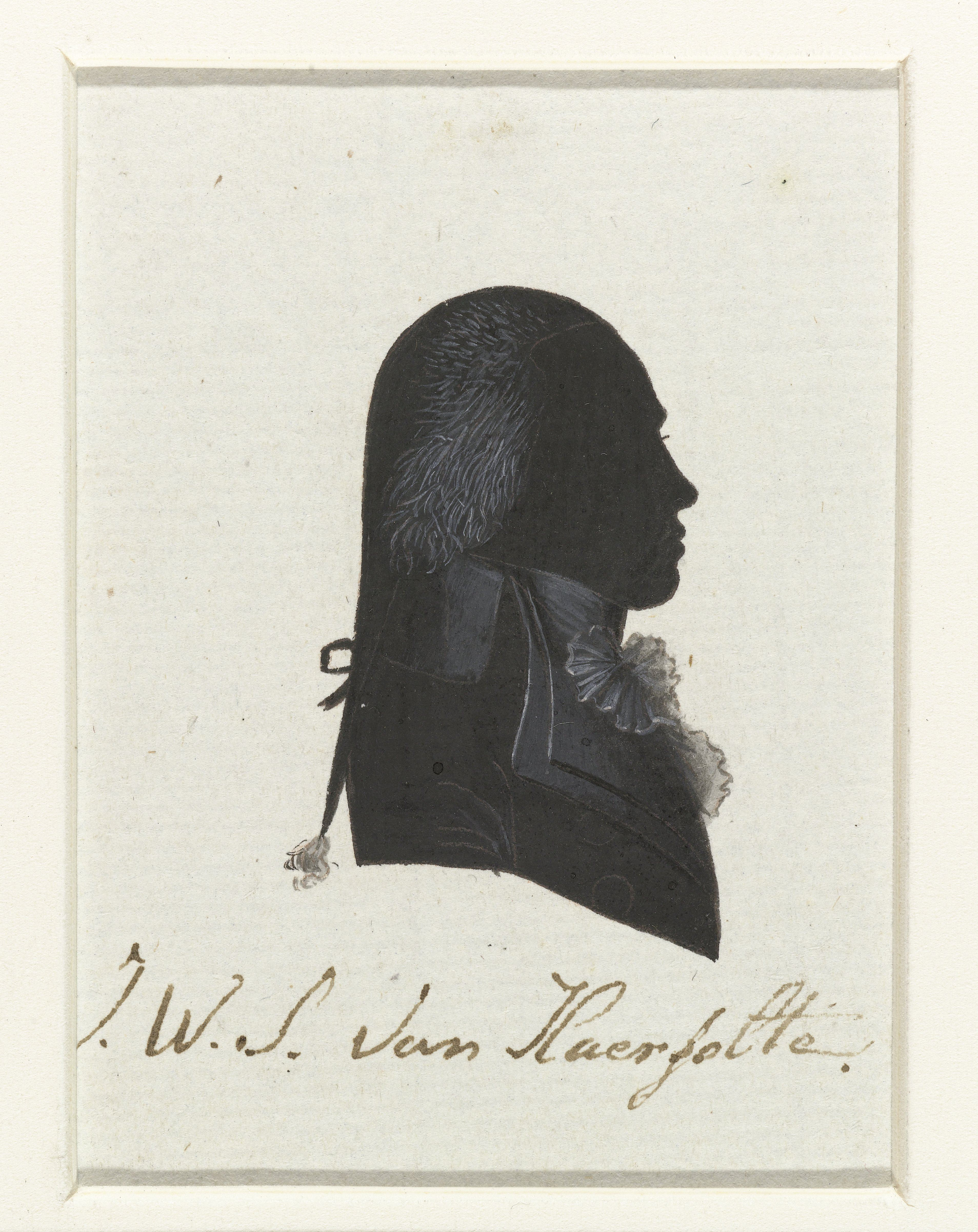 J.W.S. van Haersolte. Tekening in Oost-Indische inkt, waarschijnlijk gemaakt door Hausdorff. De tekening behoort tot een serie van portretten van afgevaardigden naar de Eerste Nationale Vergadering in 1796-1797. Van de serie werden gravures gemaakt die zijn afgedrukt in "Geschiedenis der staatsregeling, voor het Bataafsche volk", een boek van Cornelius Rogge (1799).